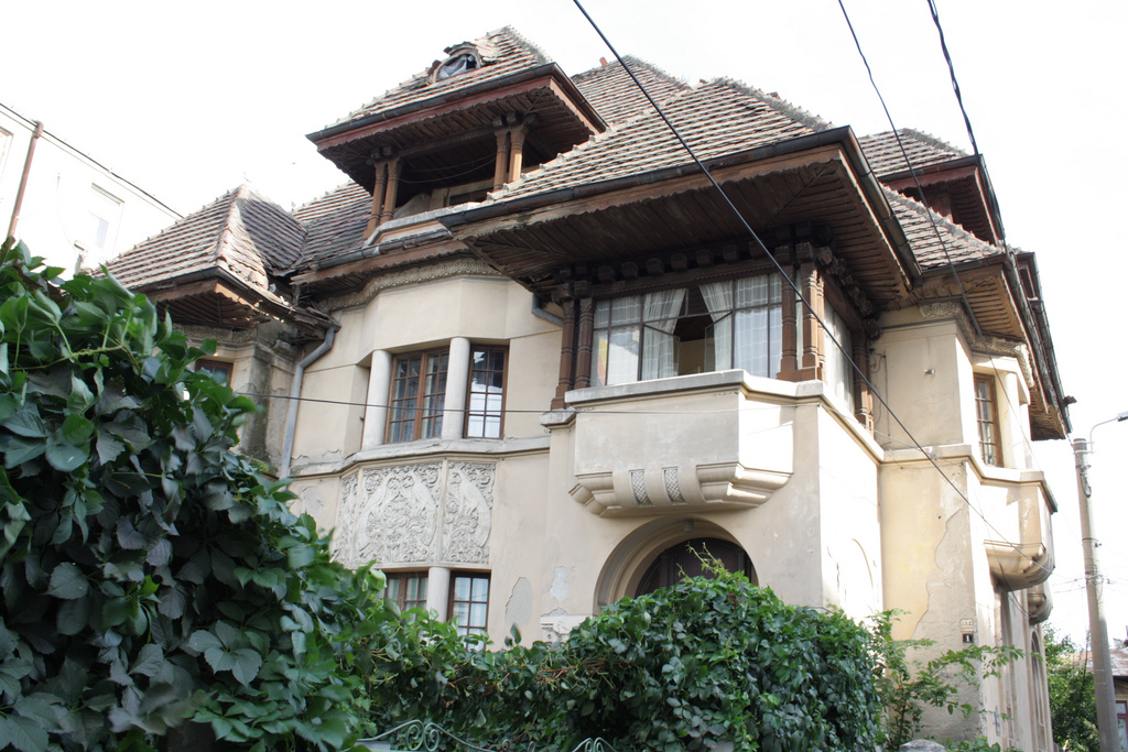 Casă - Intr. Sevastopol 1, sector 1